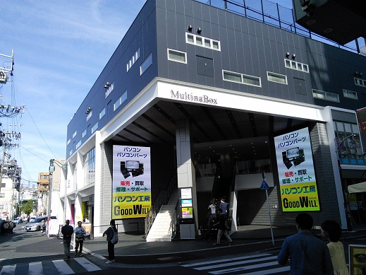 GoodWill shop at first floor of MultinaBox, Osu, Nagoya